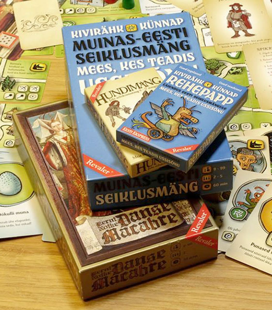 Lauamängukirjastus Revaler: Asko Künnapi loodud ja illustreeritud lauamängud.